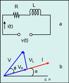 Circuito serie RL (RL serial circuit)